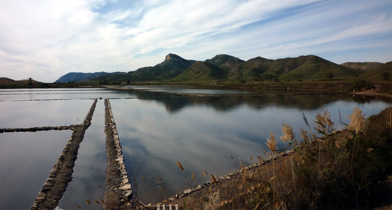 Parque regional de Calblanque (Cartagena, España). Salinas.